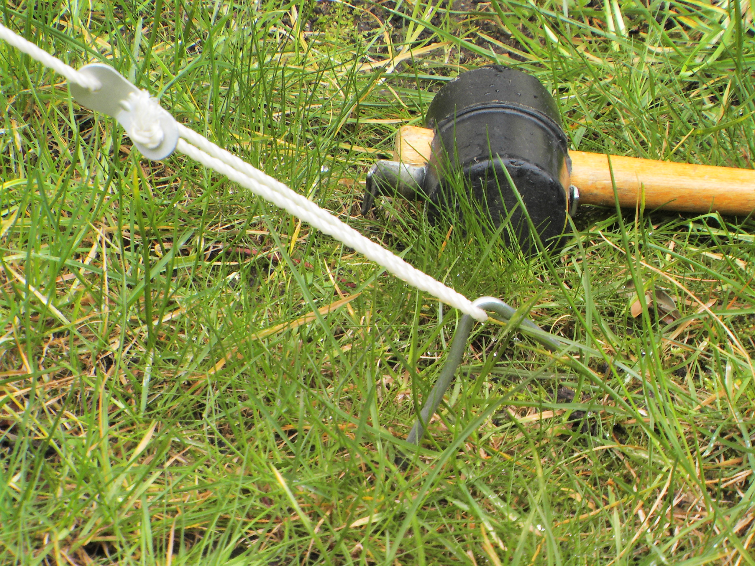 Halb in den Boden versenkter Zeltnagel